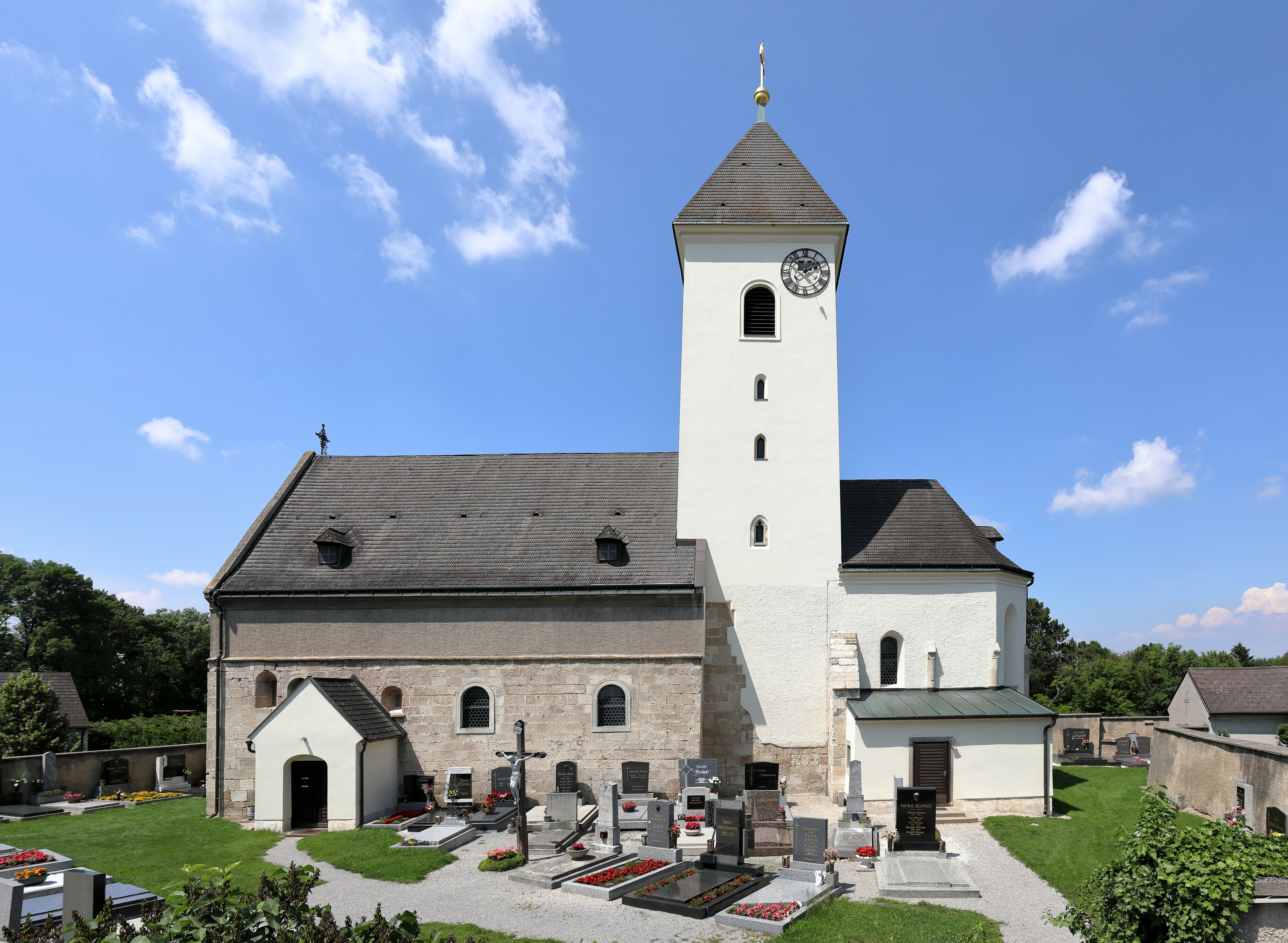 Südsüdostansicht der röm.-kath. Pfarrkirche hl. Martin in Witzelsdorf, ein Dorf in der niederösterreichischen Marktgemeinde Eckartsau. Eine spätromanische/frühgotische ehemalige Wehrkirche, die in der Barockzeit umgebaut wurde.